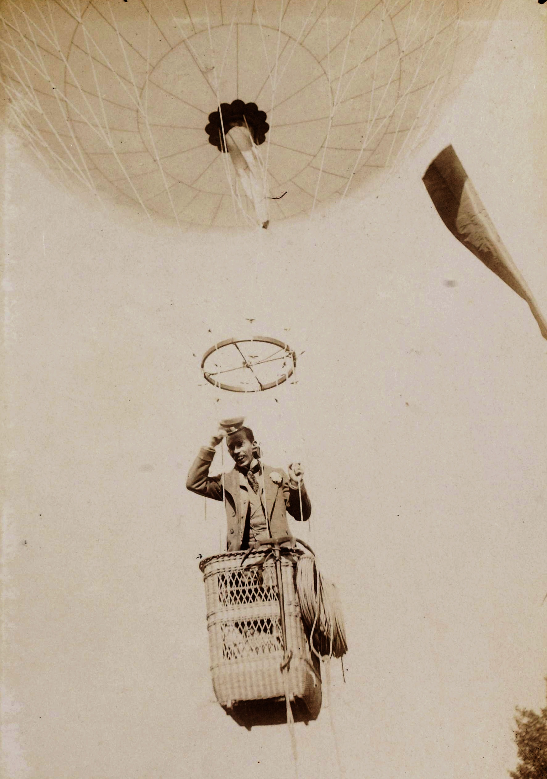 [Collection Jules Beau. Photographie sportive] : T. 7. Année 1898 / Jules Beau : F. 31. Départ d'un ballon, Jardin d'acclimatation, juillet 1898